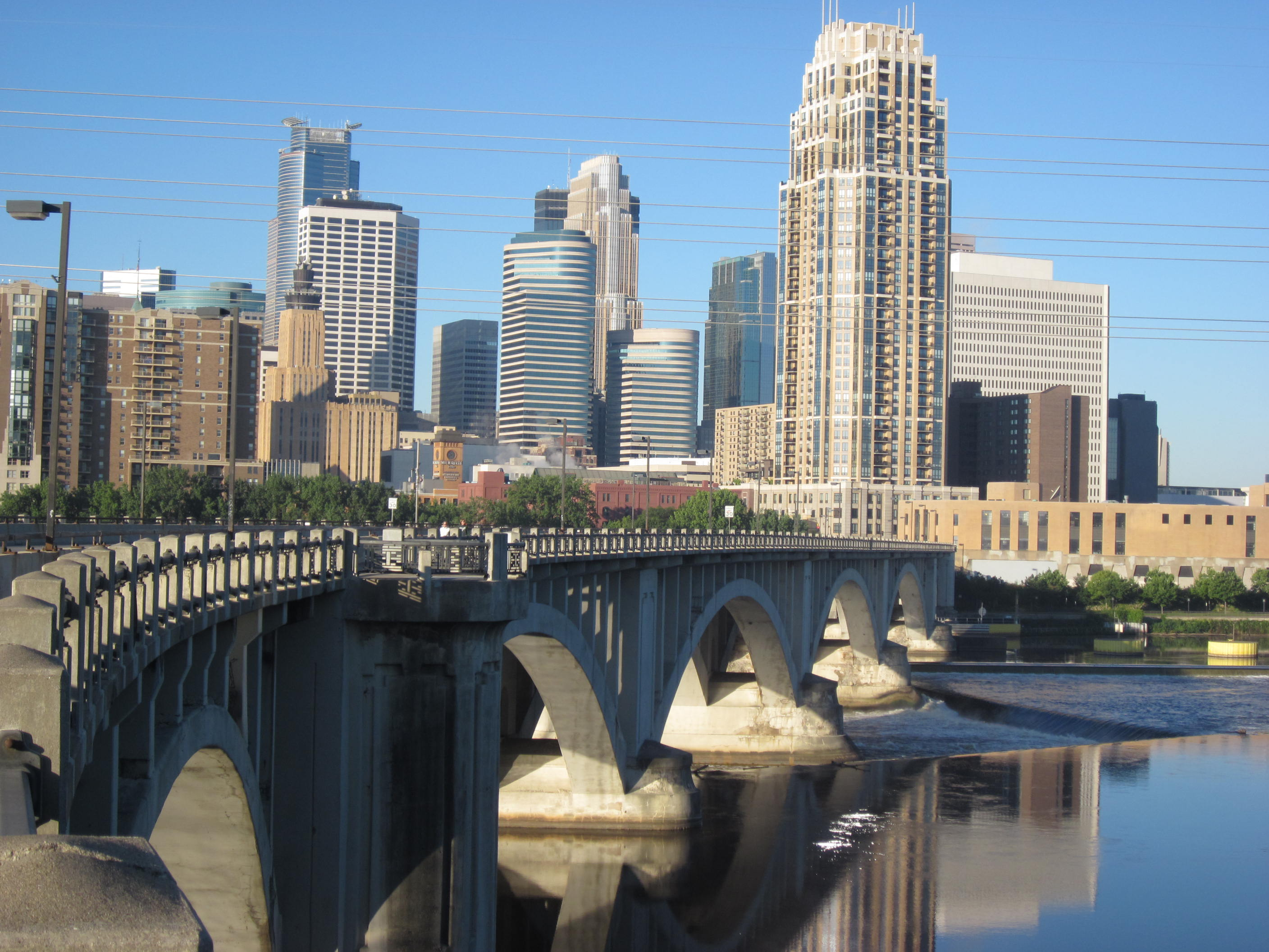 Minneapolis, Minnesota